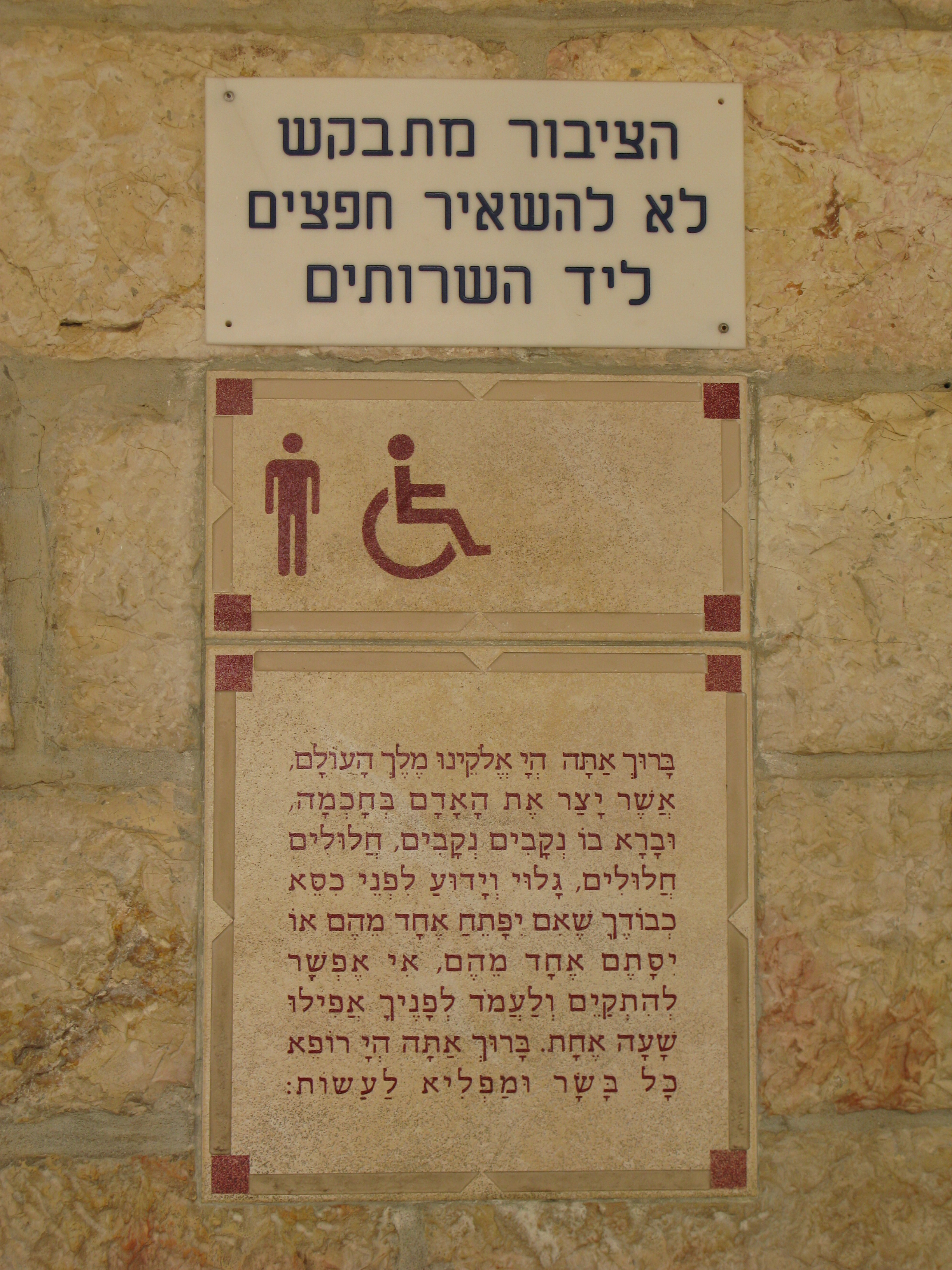 Jerusalem 206 Jerusalem